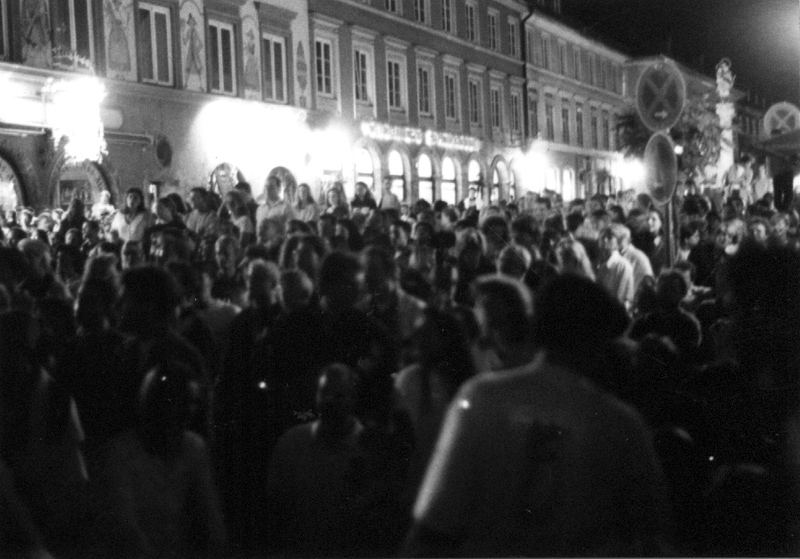 KultURKNALL 1996 Sonstiges: Zur Verfügung gestellt von Menschen Helfen e.V.